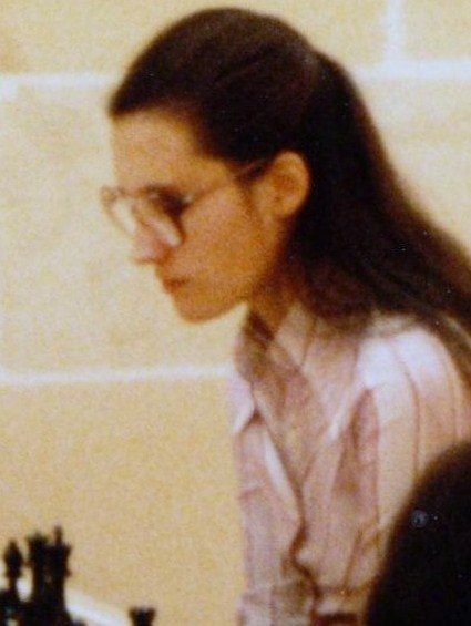 Ruth Haring, 10. Runde am 30. November 1980, Schacholympiade 1980 auf Malta.